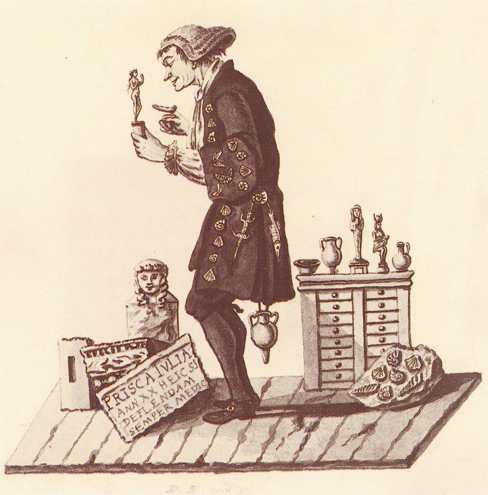 Karikatur von Johann Jakob d'Annone (1728-1804), Professor an der Universität Basel, Sammler von Naturalien und Antiquitäten. Aquarell von Daniel Burckhardt-Wildt (1752-1819).